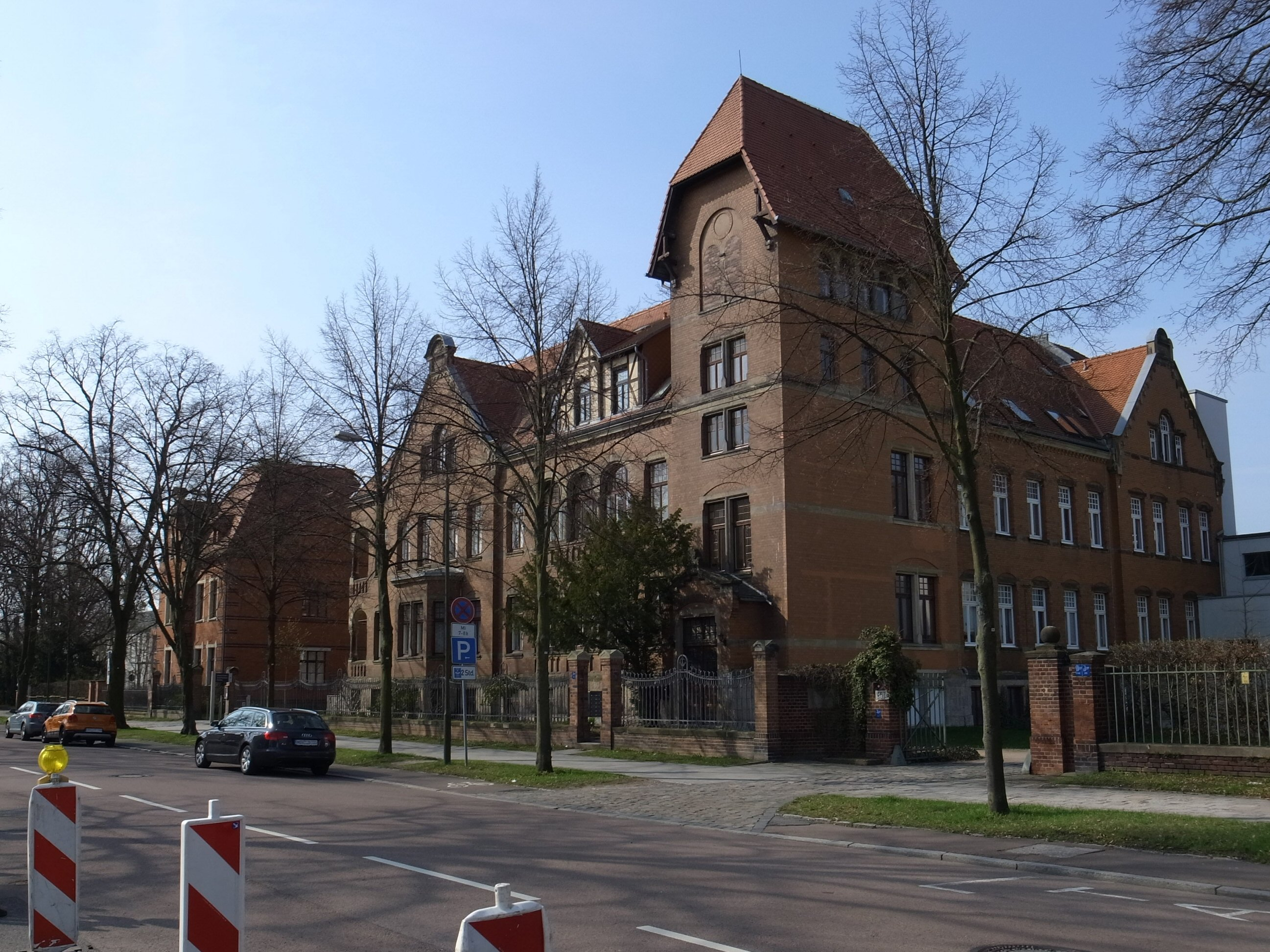 Dessau-Roßlau, Gropiusallee 3, Anhaltische Diakonissenanstalt Dessau (Baudenkmal im Denkmalverzeichniss Sachsen-Anhalt, Erfassungsnummer: 094 40972 000 000 000 000 [1])